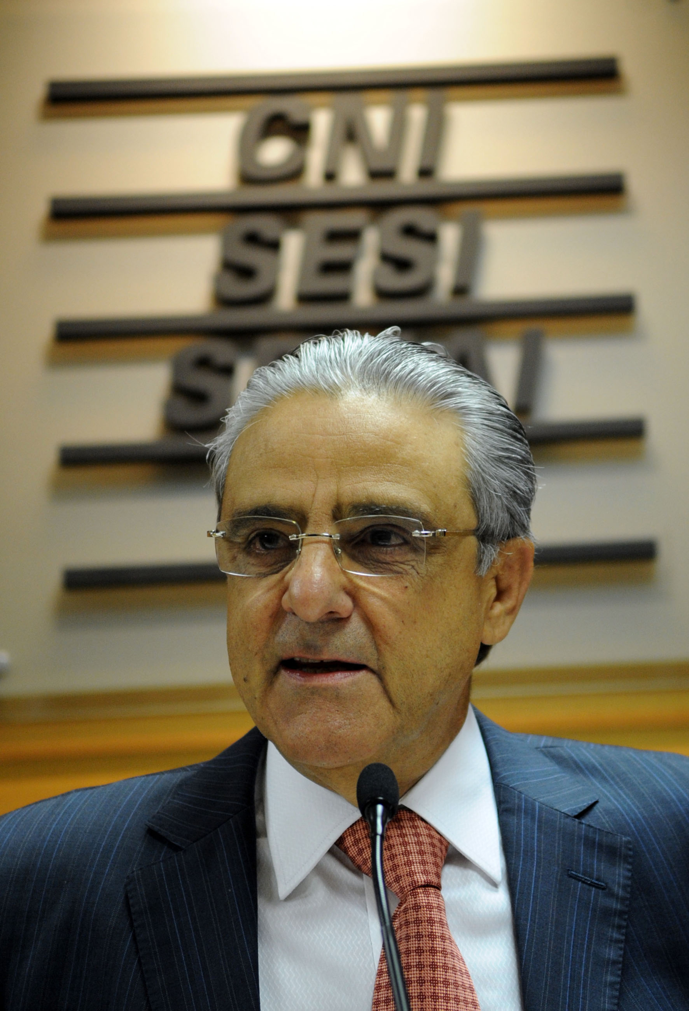 O novo presidente da Confederação Nacional da Indústria (CNI), Robson Braga de Andrade, anuncia a agenda da indústria para os próximos quatro anos.